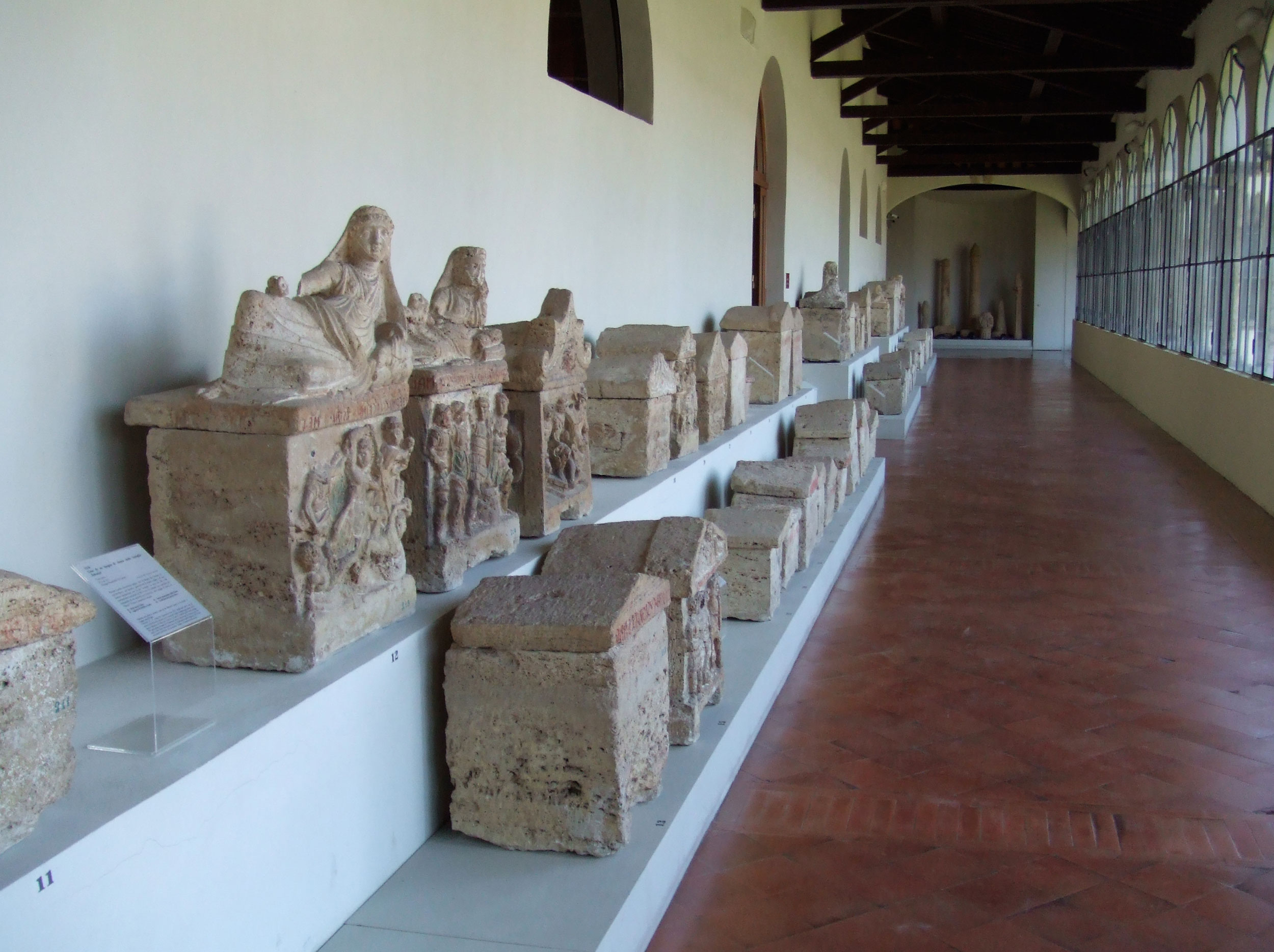 Galerie supérieure du cloître - expositions d'urnes étrusques